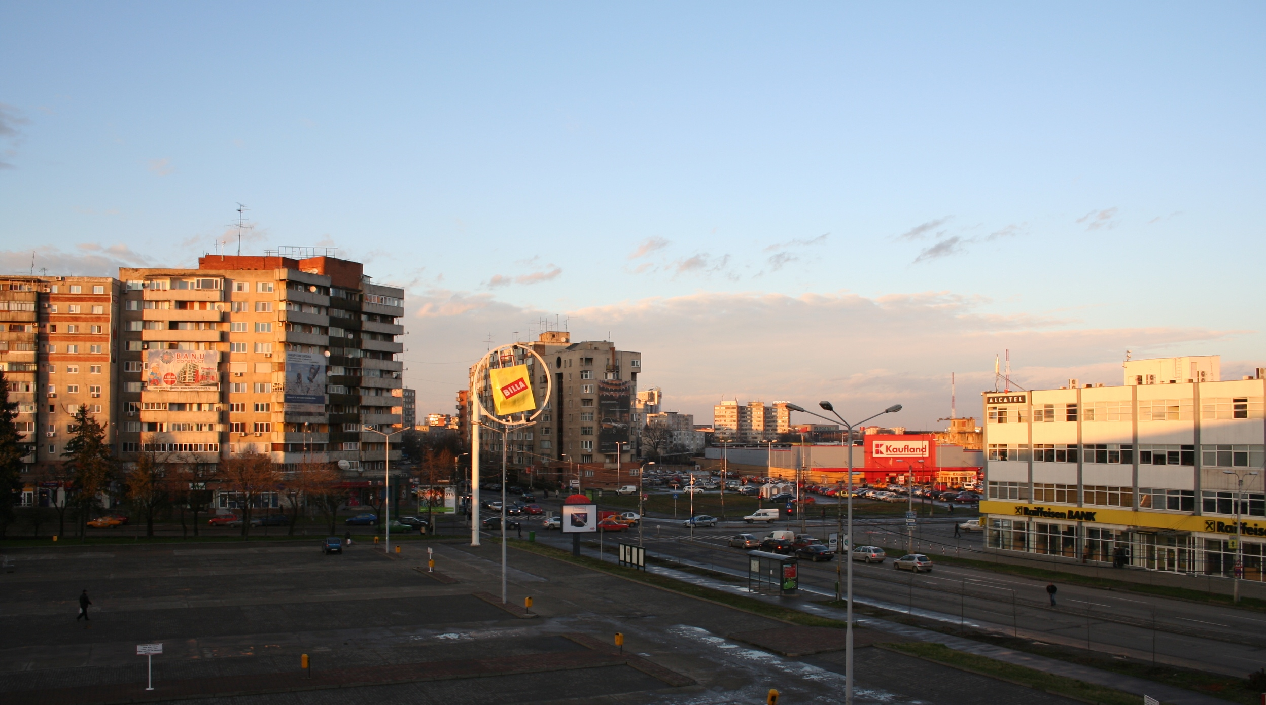 Cartierul Circumvalaţiunii, Timişoara. Intersecţia Calea Circumvalaţiunii - str. Gh. Lazăr